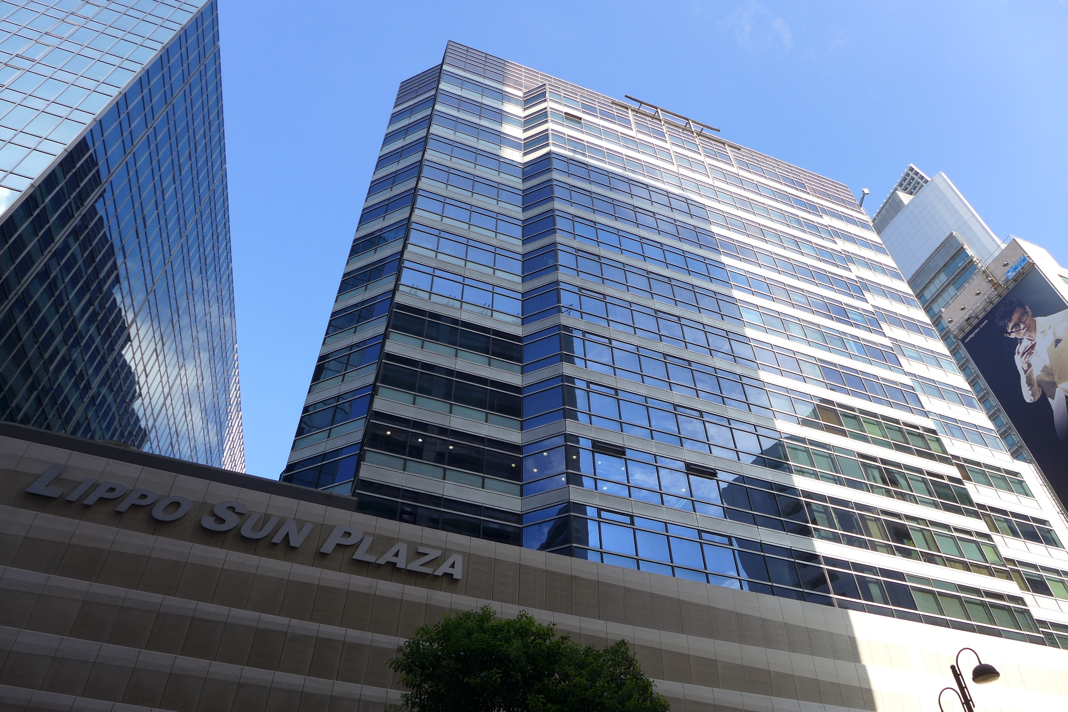 Lippo Sun Plaza